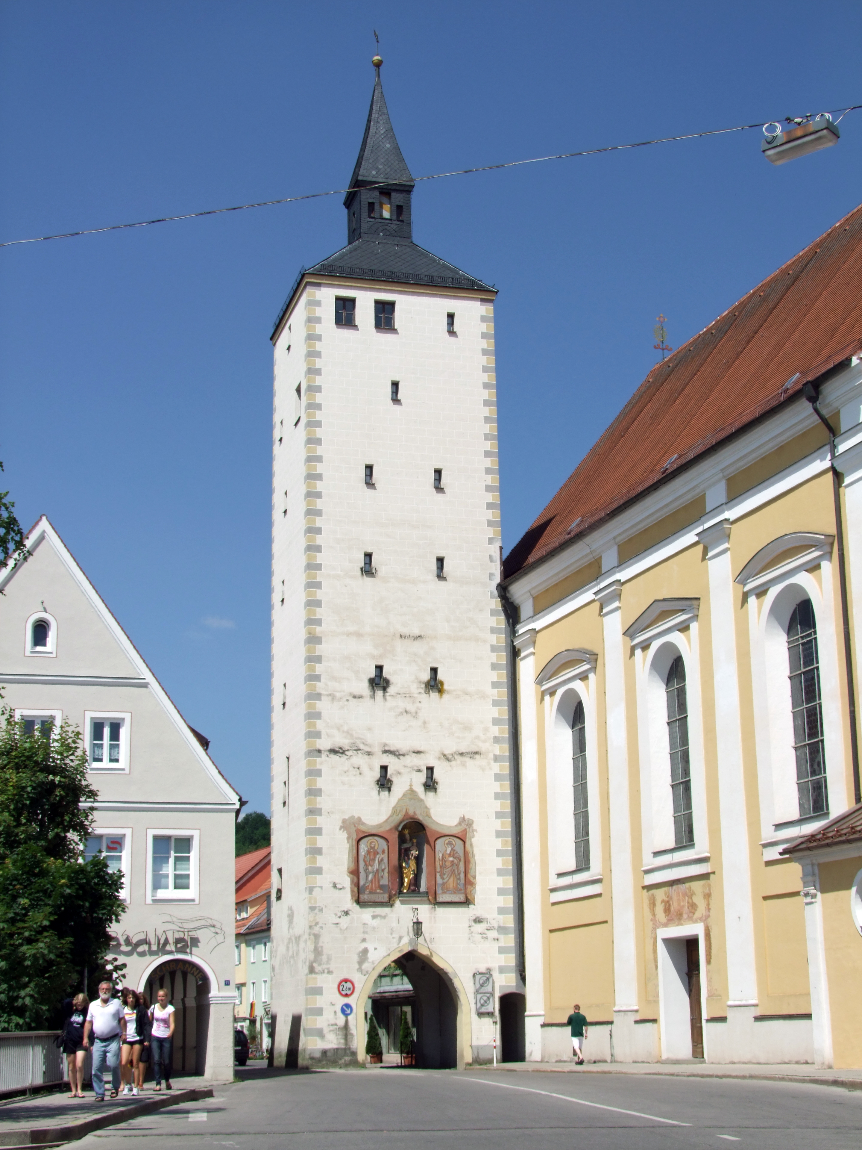 Mariä Verkündigung im oberschwäbischen Mindelheim. Ehemalige Augustiner, dann Jesuitenklosterkirche.